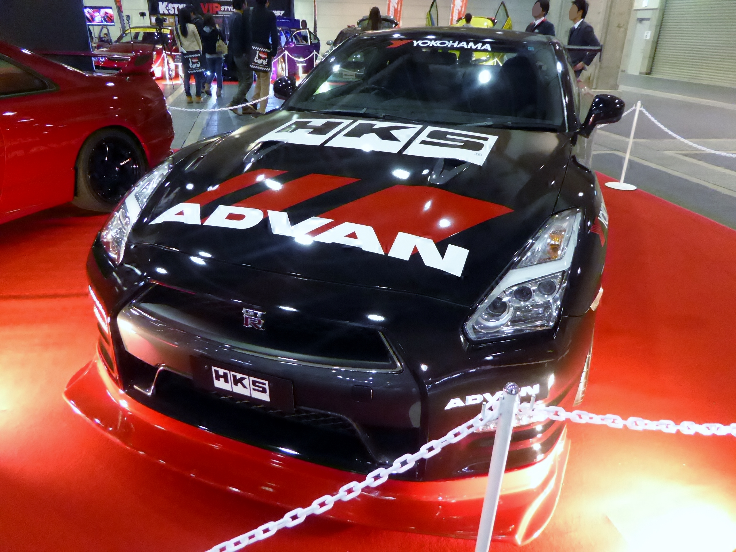 大阪オートメッセ2016においてHKSが手掛けたDBA-R35型日産・GT-Rを撮影。